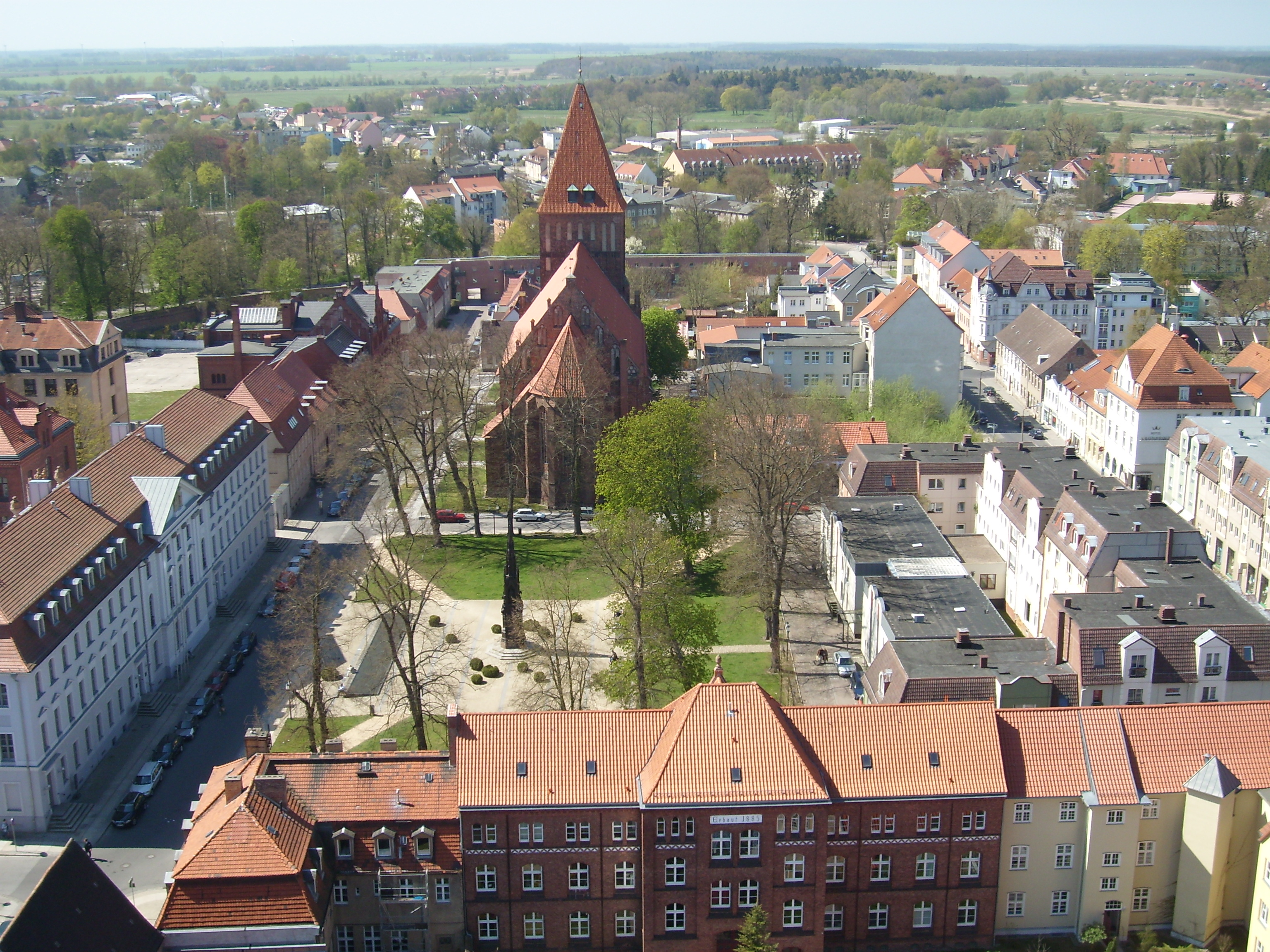 Blick von der Aussichtsplattform (auf 60 m Höhe) des Turms des Greifswalder Doms St. Nikolai nach Westen auf die St.-Jacobi-Kirche. Davor der 2006 neugestaltete Rubenowplatz mit dem ebenfalls 2006 restaurierten Rubenowdenkmal und rechts davon mit Flachdach das Gebäude der Theologischen Fakultät (Rubenowplatz 2/3).